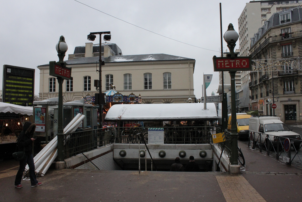 Accès de la station Mairie d'Issy sur la ligne 12 du métro de Paris